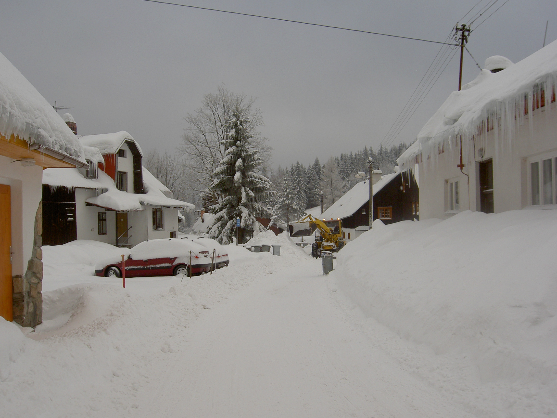 Petříkov, část obce Ostružná